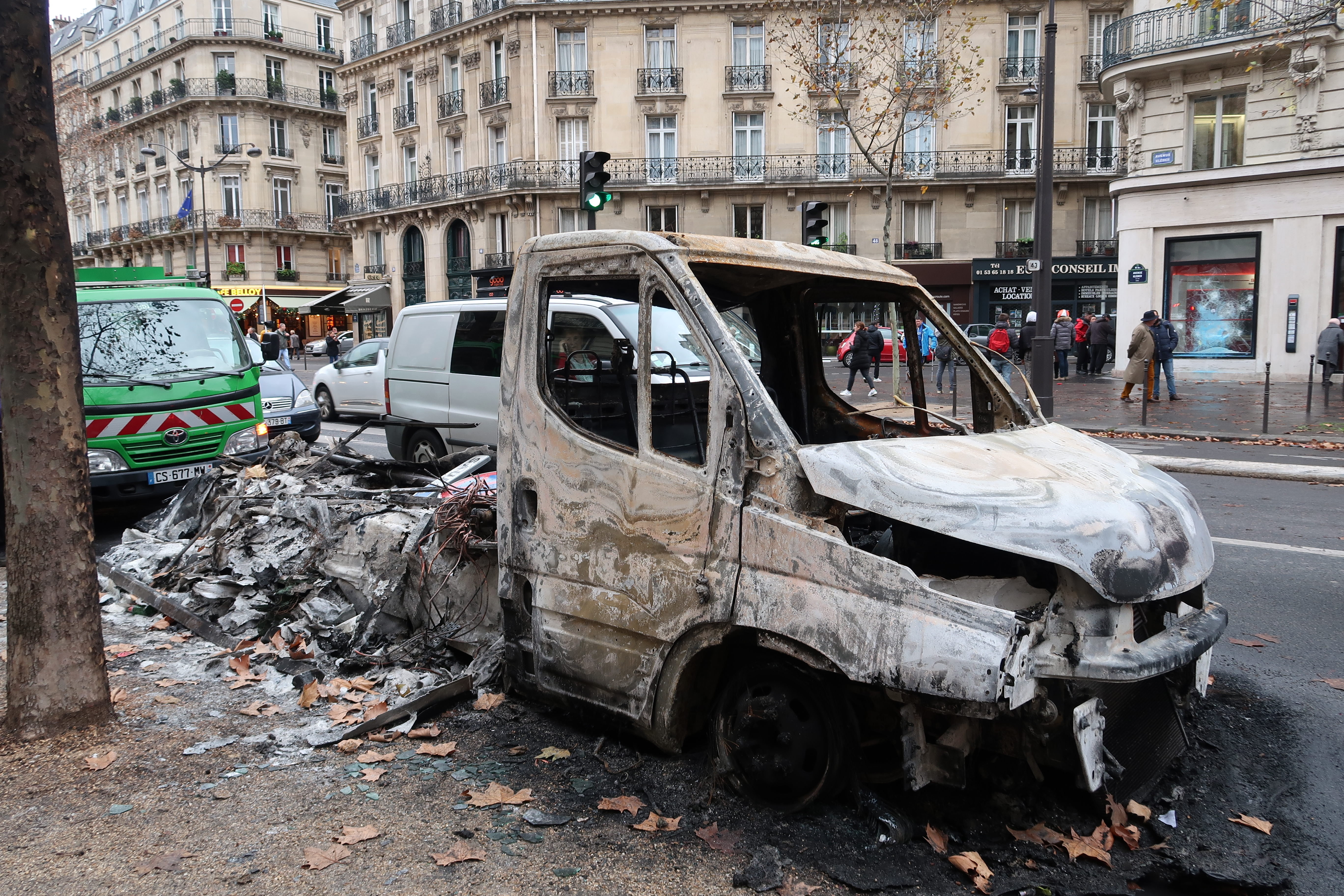 Véhicule incendié avenue Kléber (Paris, 16e). Photo prise le lendemain de la manifestation du mouvement des Gilets jaunes du 1er décembre 2018.